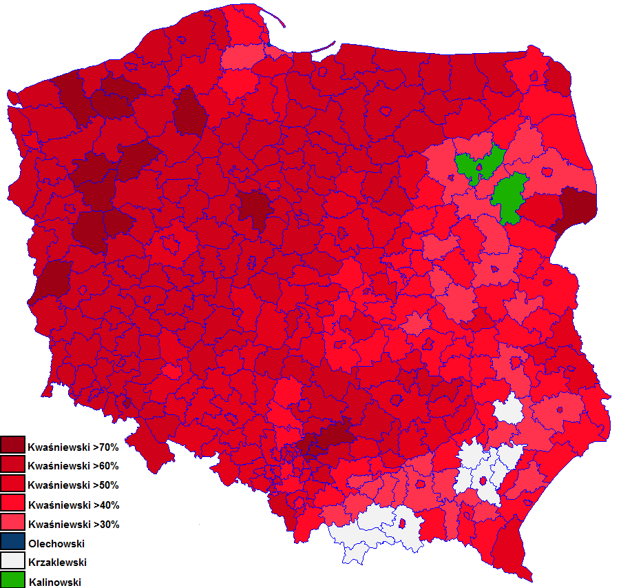 wybory prezydenckie 2000